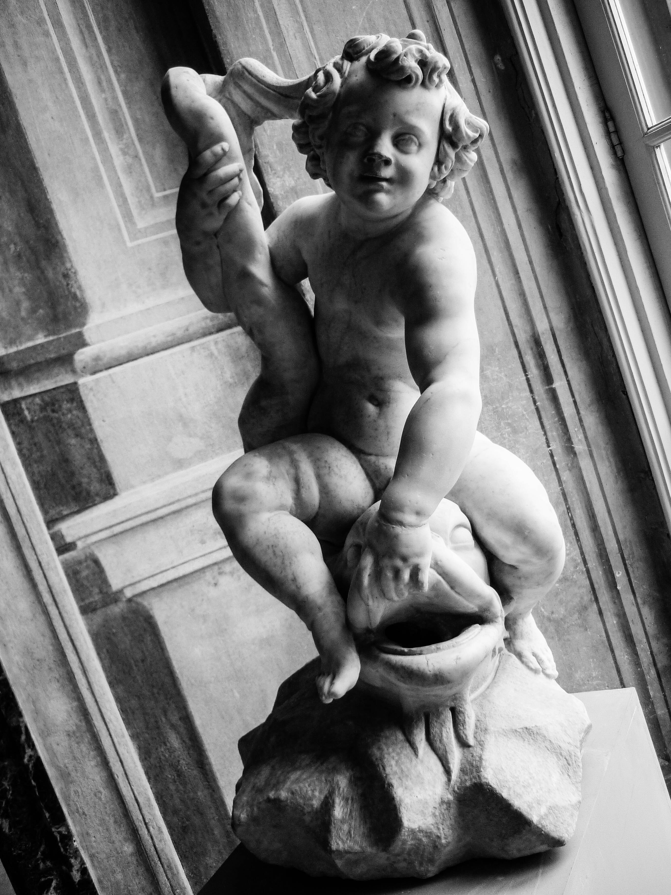 Palazzo Rosso - Musei di Strada Nuova This is a photo of a monument which is part of cultural heritage of Italy.